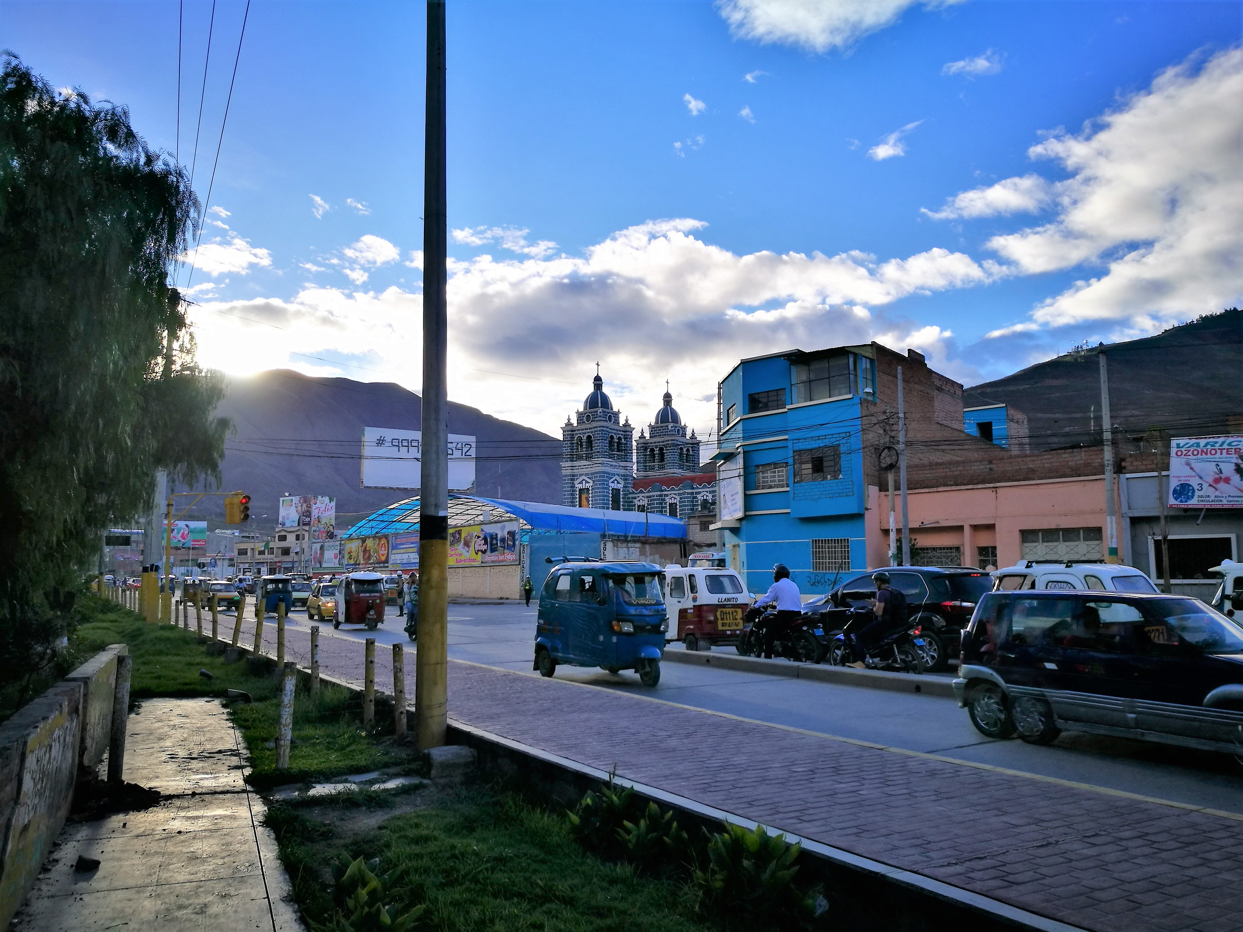 Malecón Alomia Robles amb església de San Sebastián, Huánuco